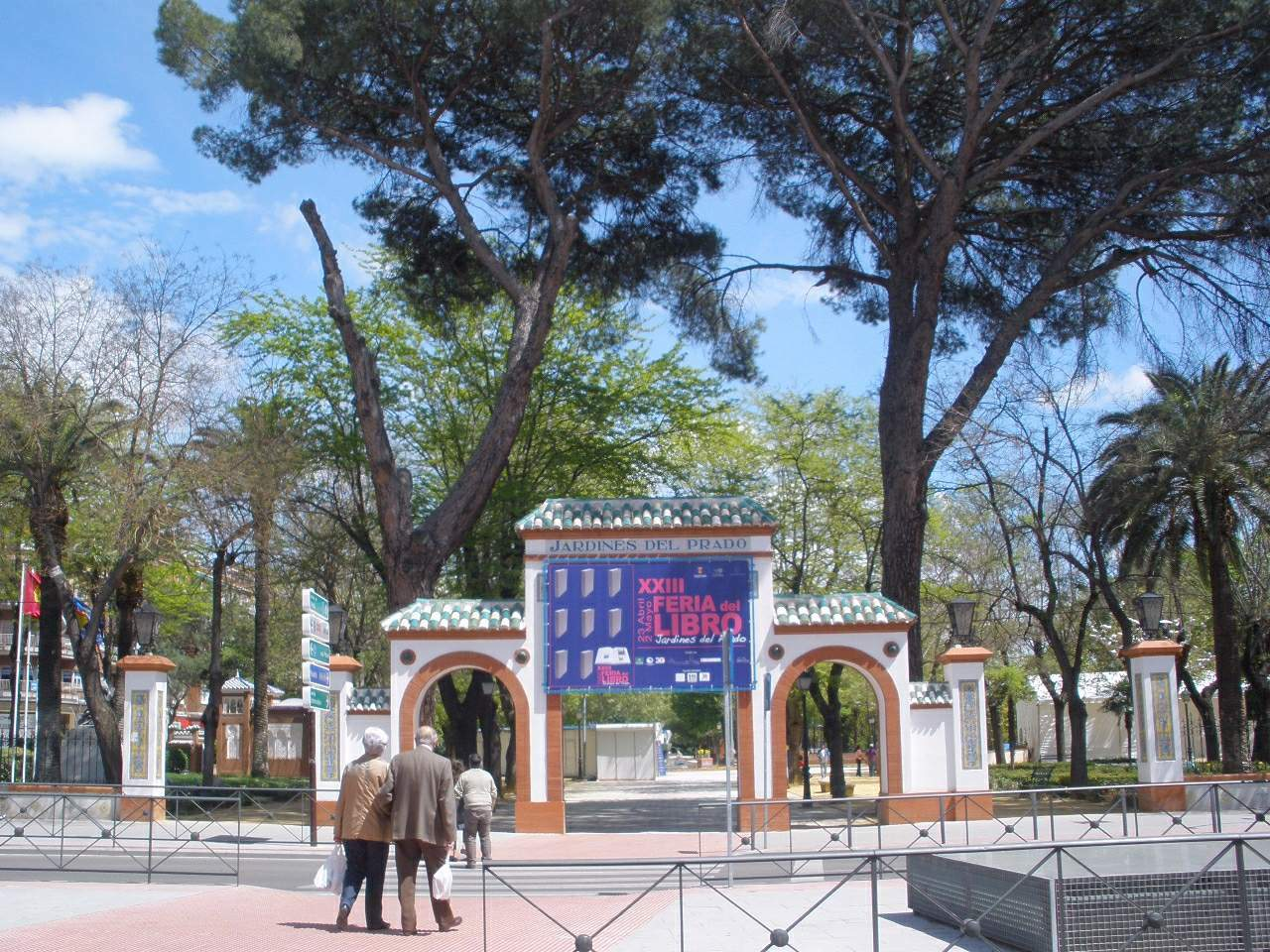 Jardines del Prado (Talavera de la Reina, Toledo)